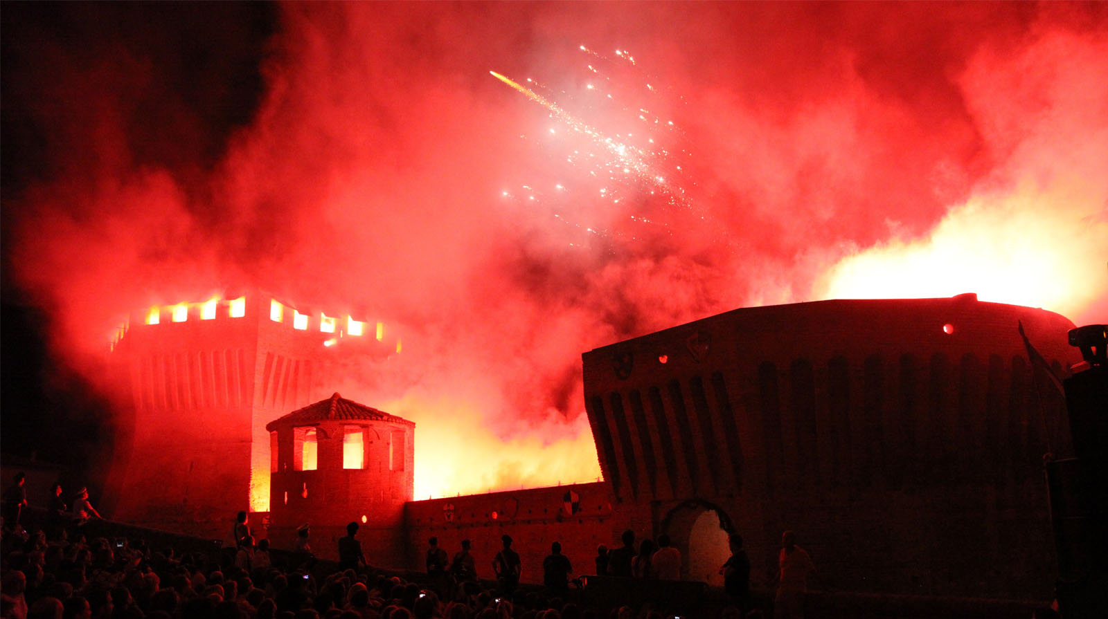 Spettacolo pirotecnico alla Caccia al Cinghiale di Mondavio